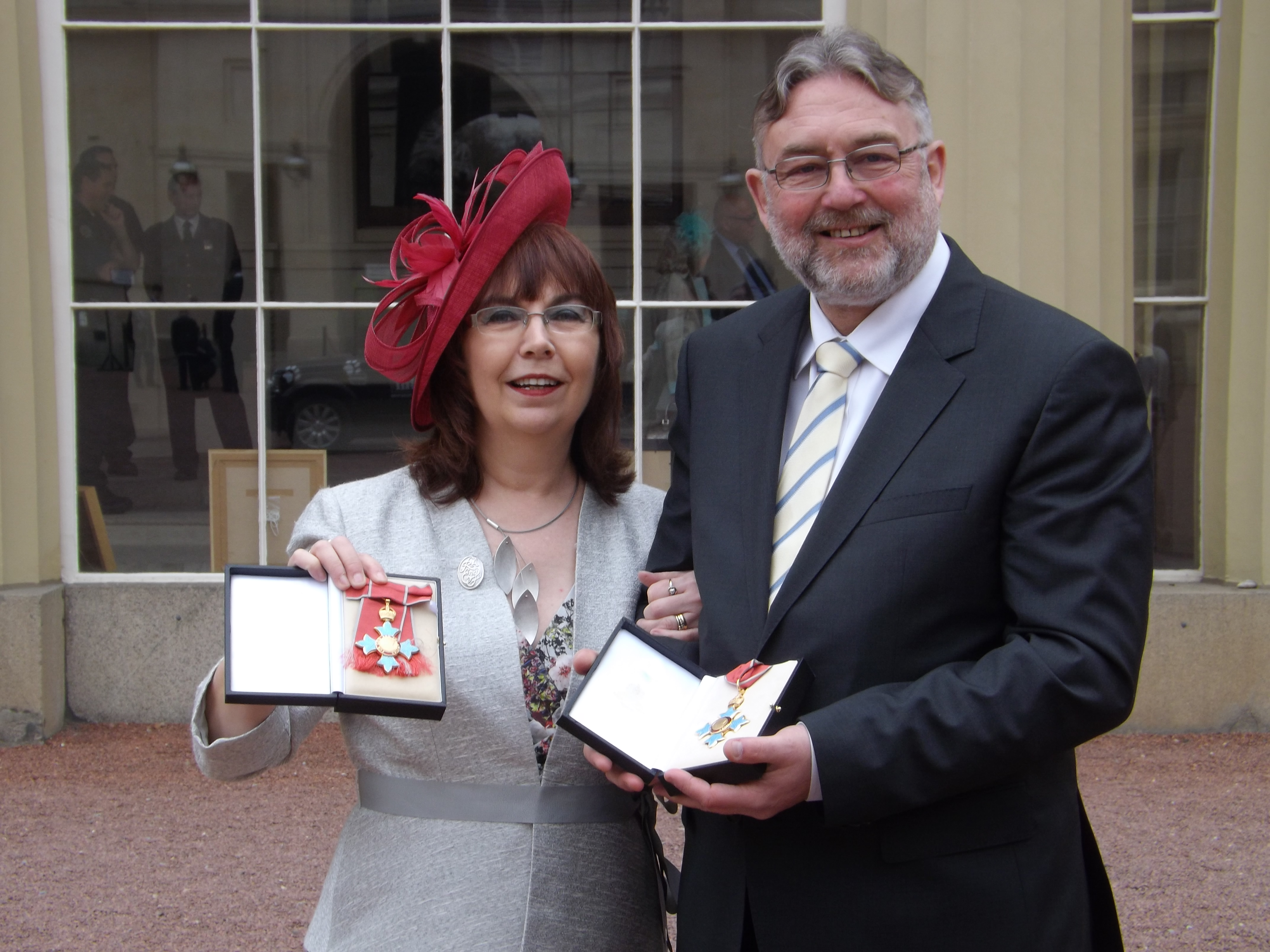 At buckingham palace, picking up gongs 2014